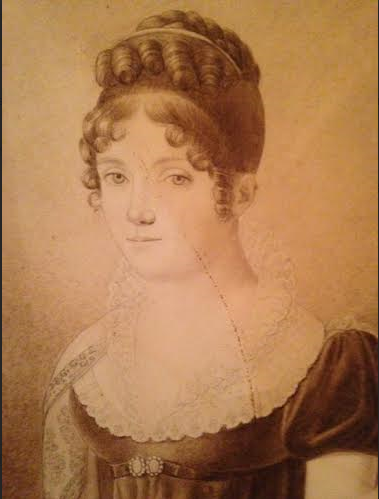 La comtesse Bérenger (1773- 1828), épouse du comte Jean Bérenger(1767-1850), pair de France